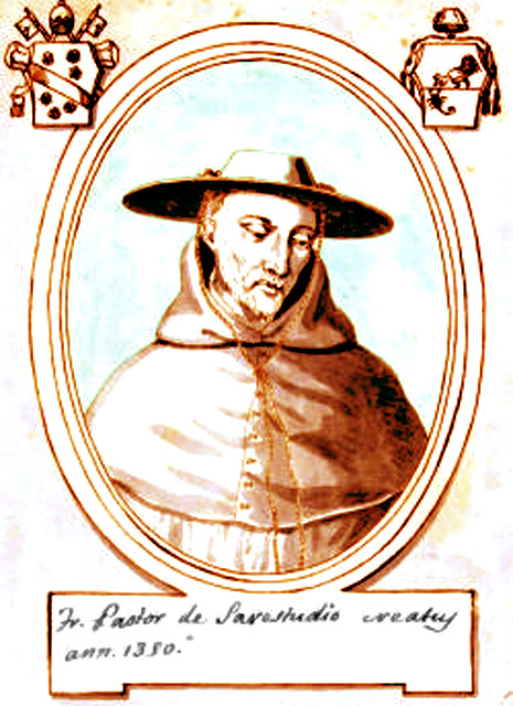 Cardinal Pasteur de Sarrats